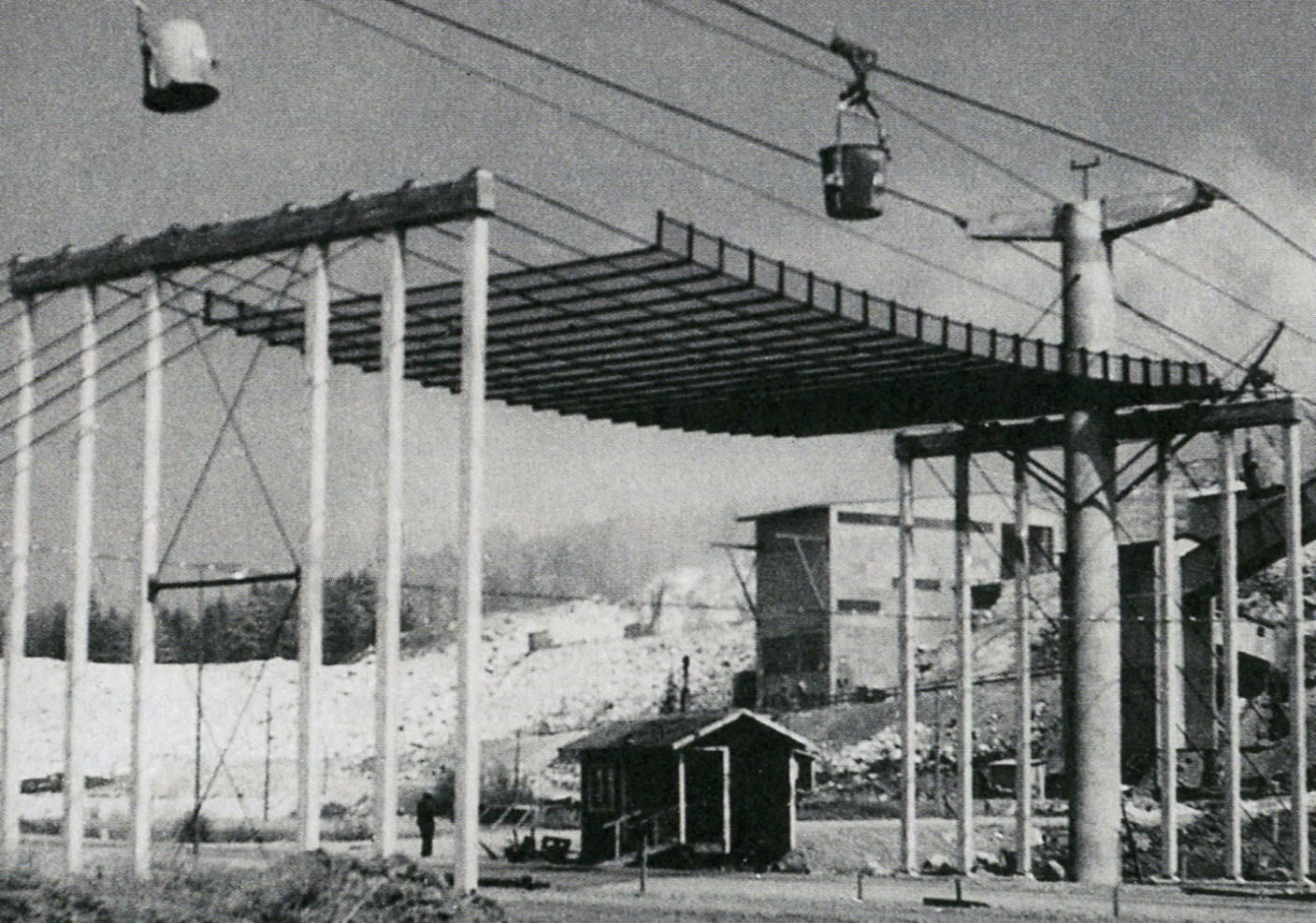 Stora Vika cementfabrik, fabrikens linbana